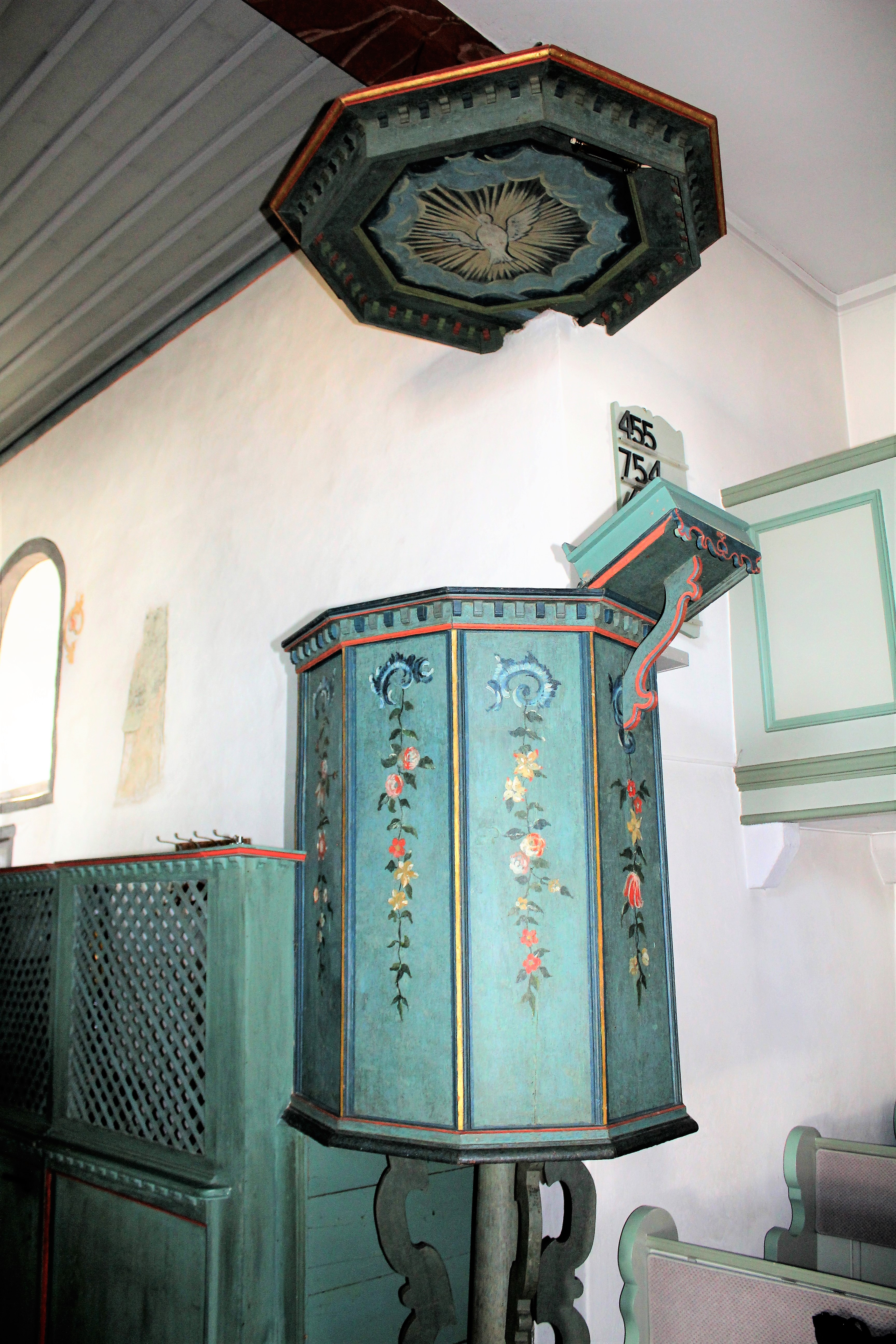 Evangelische Kirche Garbenteich, Pohlheim, Landkreis Gießen, Hessen, Deutschland